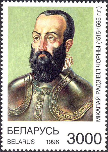 Беларуская (тарашкевіца): Мікалай Радзівіл «Чорны» (Mikałaj Radzivił «Čorny»). Белпошта